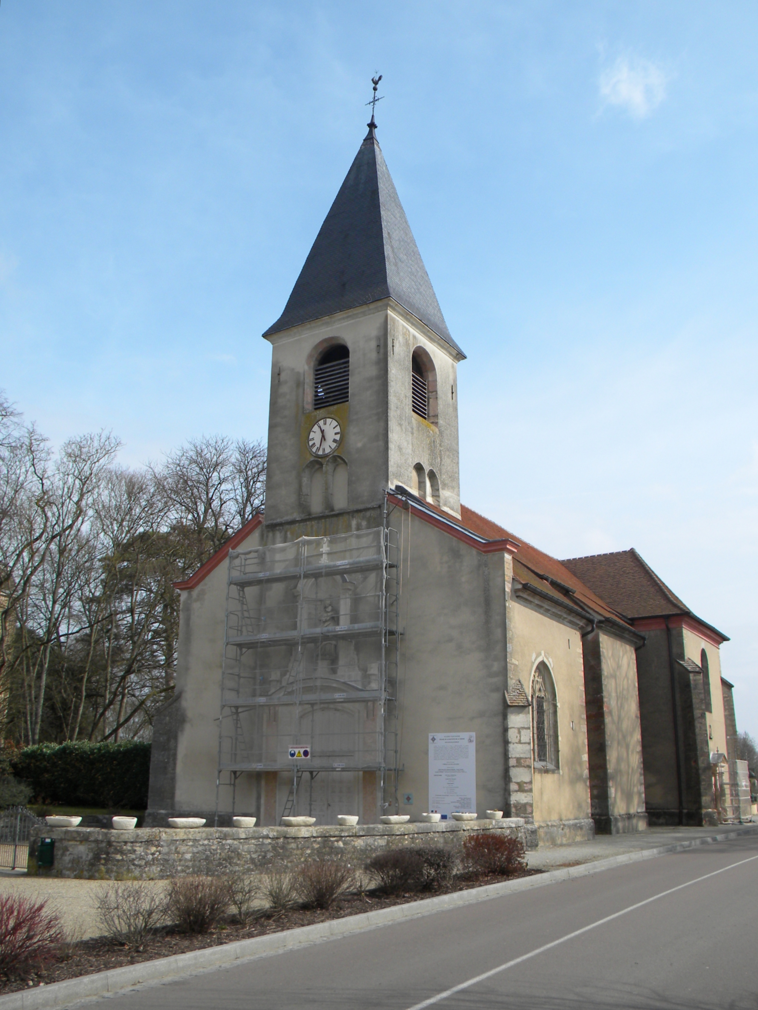 Eglise